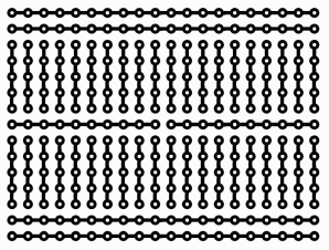 인쇄회로기판용 구멍기판